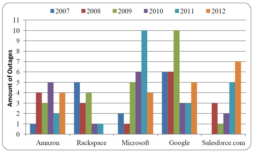 Barregraphe des volumétrie d'incidents par fournisseurs